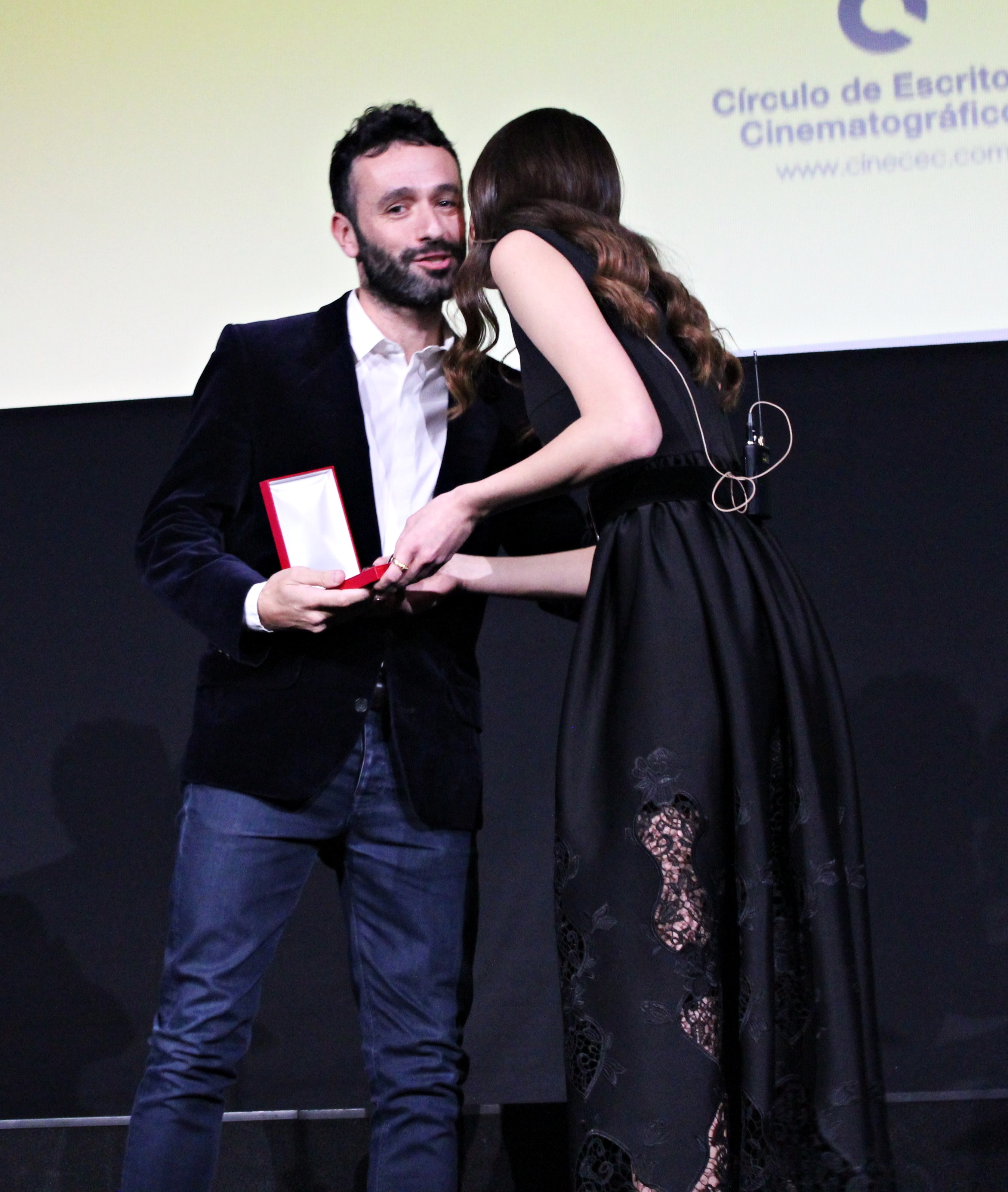 El cineasta español Rodrigo Sorogoyen recibe de la actriz Sandra Escacena la Medalla del Círculo de Escritores Cinematográficos al mejor guion original por su trabajo en la película El reino.